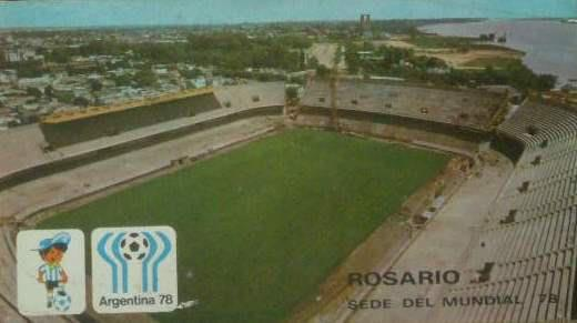 Postal del Gigante de Arroyito, en vísperas de celebrarse el Mundial 1978.